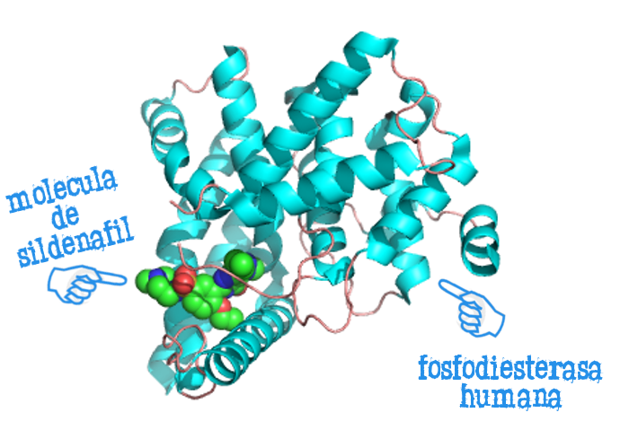 Unión del Sildenafil con la fosfodiesterasa 5.